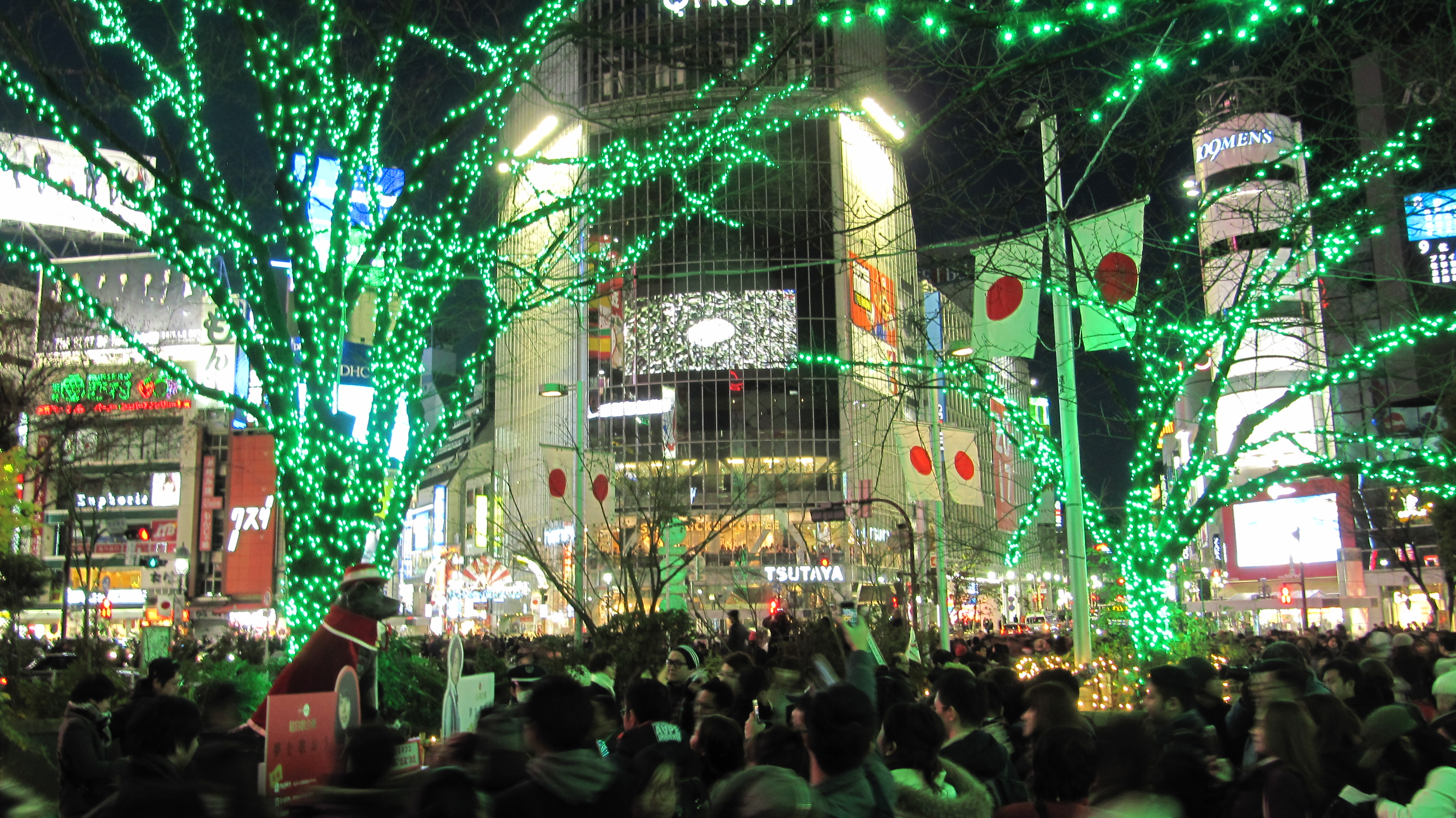 Shibuya, Tokio, Japón